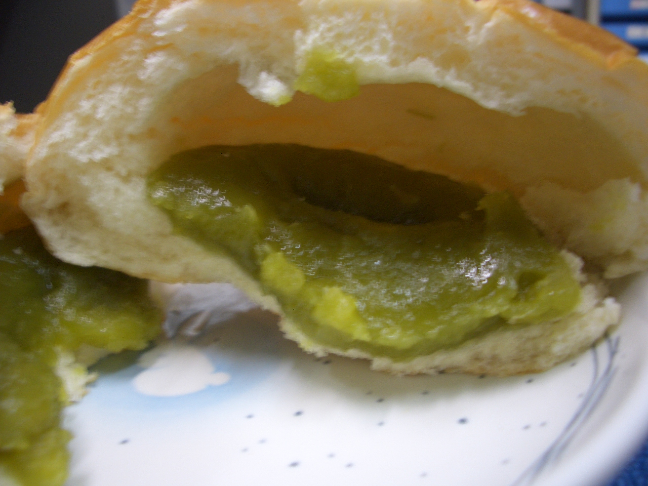 うぐいすあんパンの断面。緑色のうぐいすあんが入っている。